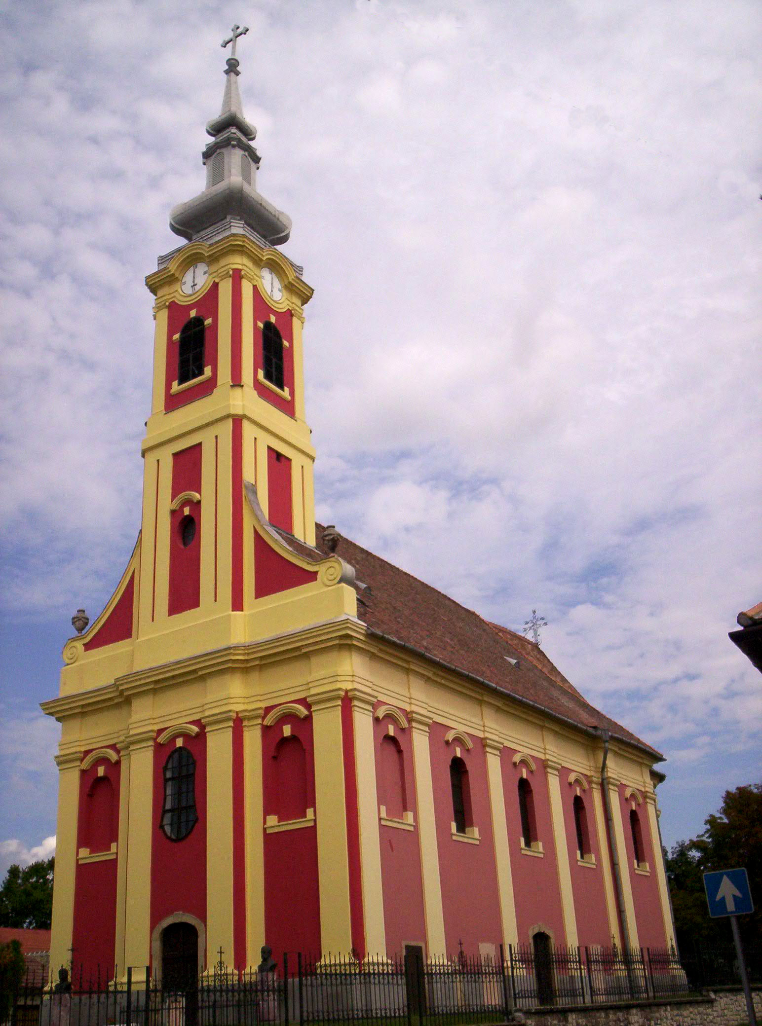 A bajai Szent Miklós görögkeleti Plébániatemplom – photo taken by uploader User:Csanády in 2006.